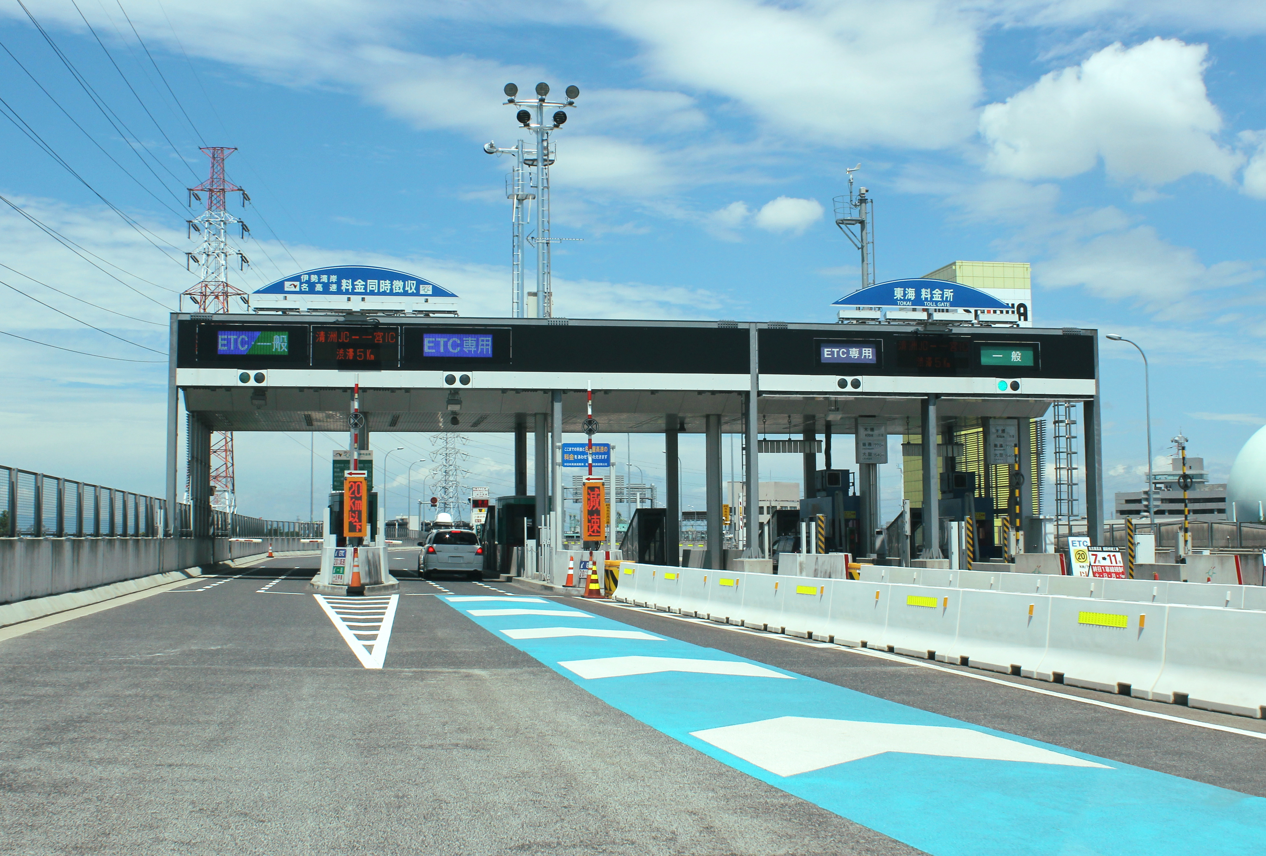 名古屋高速4号東海線 東海料金所